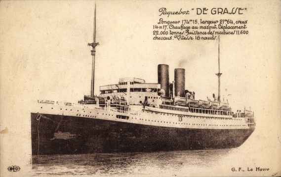 Le paquebot français De Grasse.